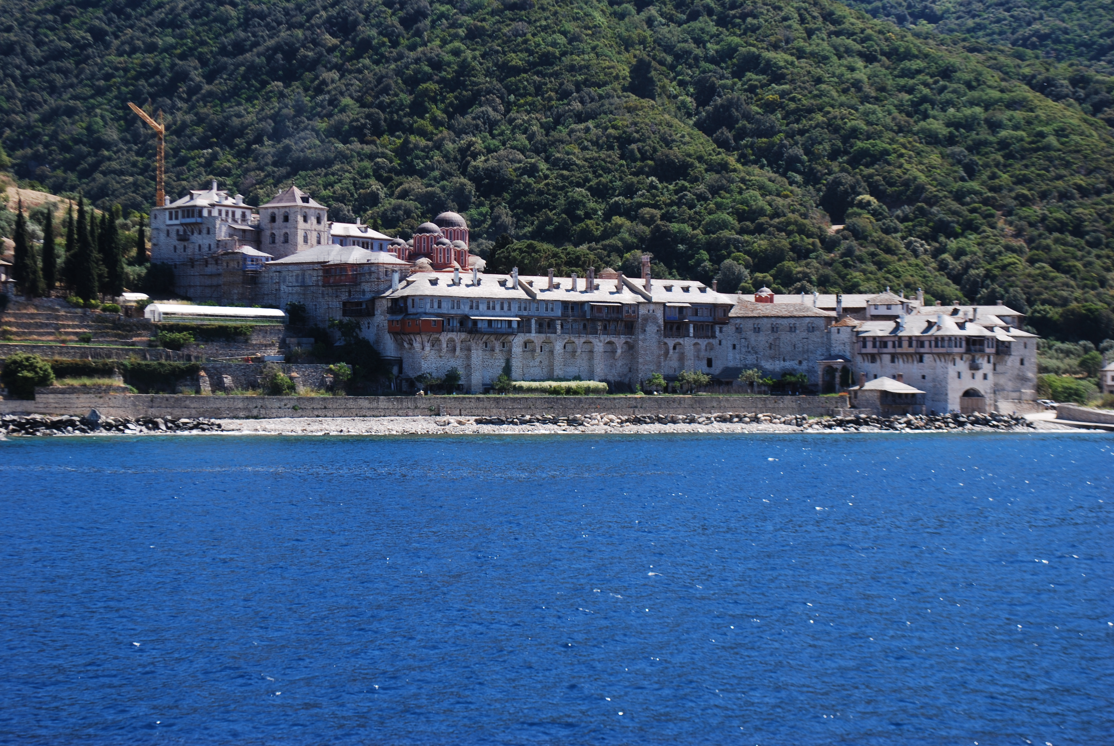 Vue de la croisière le long de la côte Ouest du Mont Athos, à bord du bateau "Kapetan Photis".